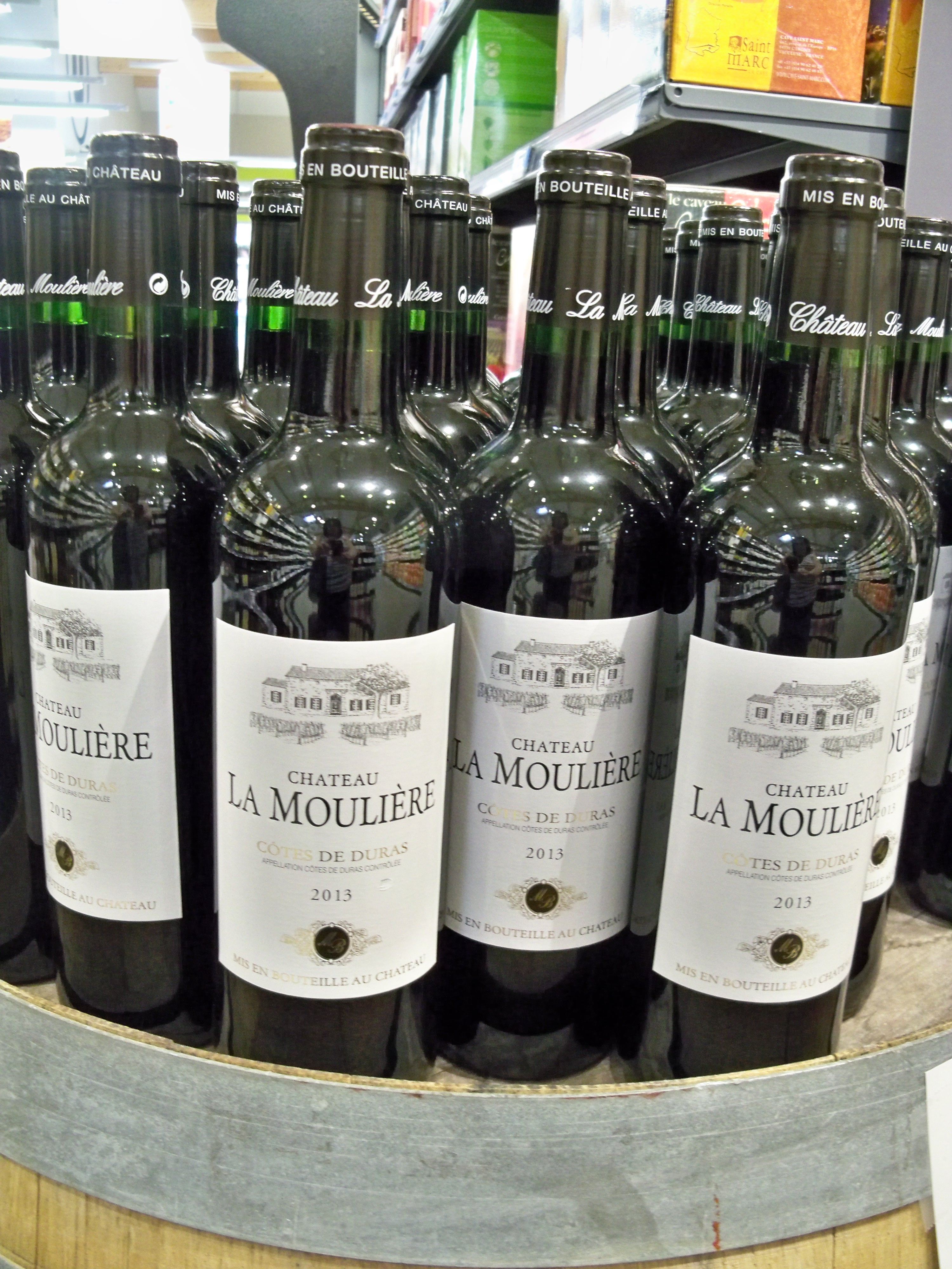 Bouteille de Côtes de Duras